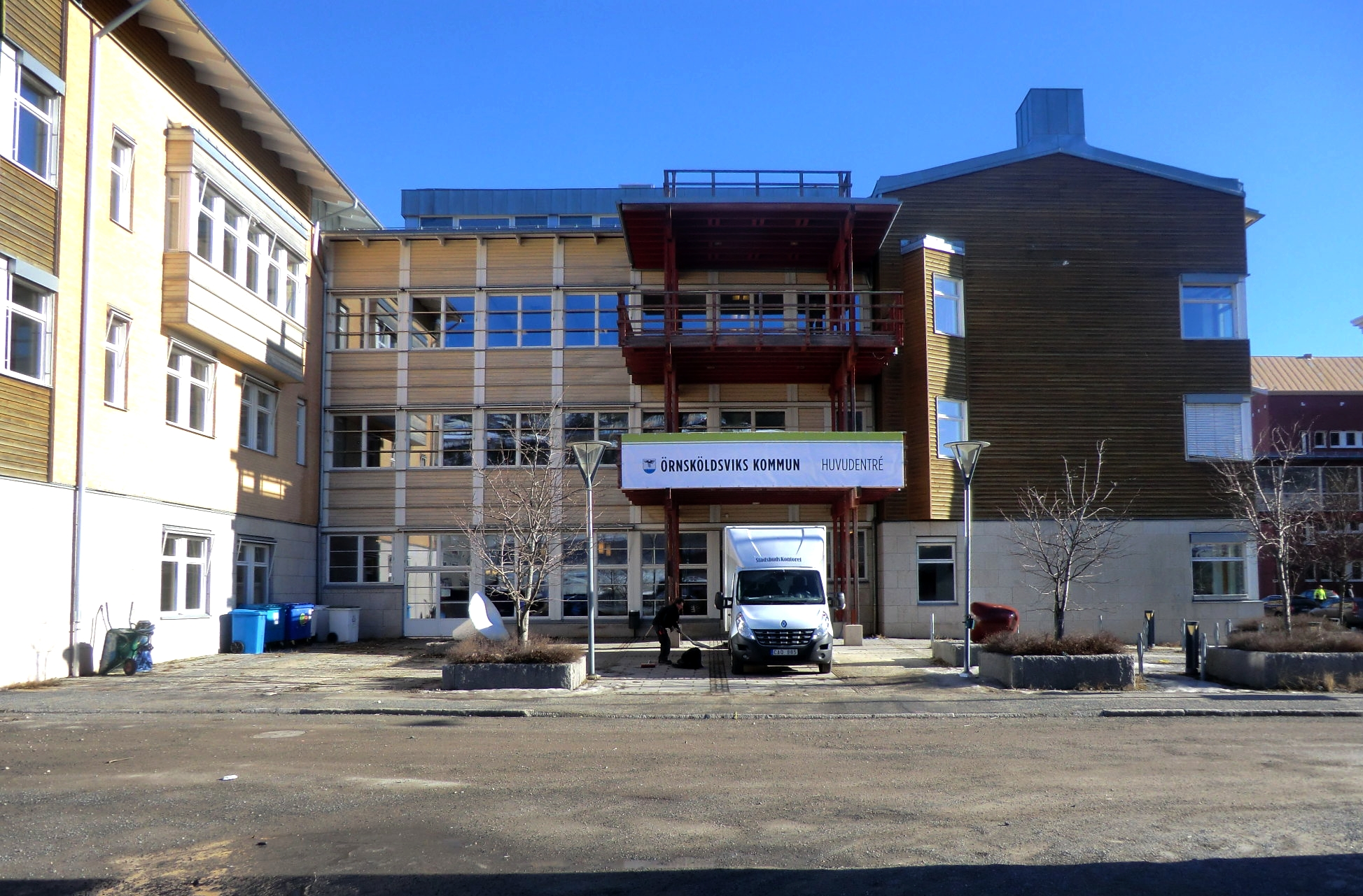 Örnsköldsviks stadshus, bild från inflyttningen till nya lokalerna i kvarteret Kronan i mars 2015.